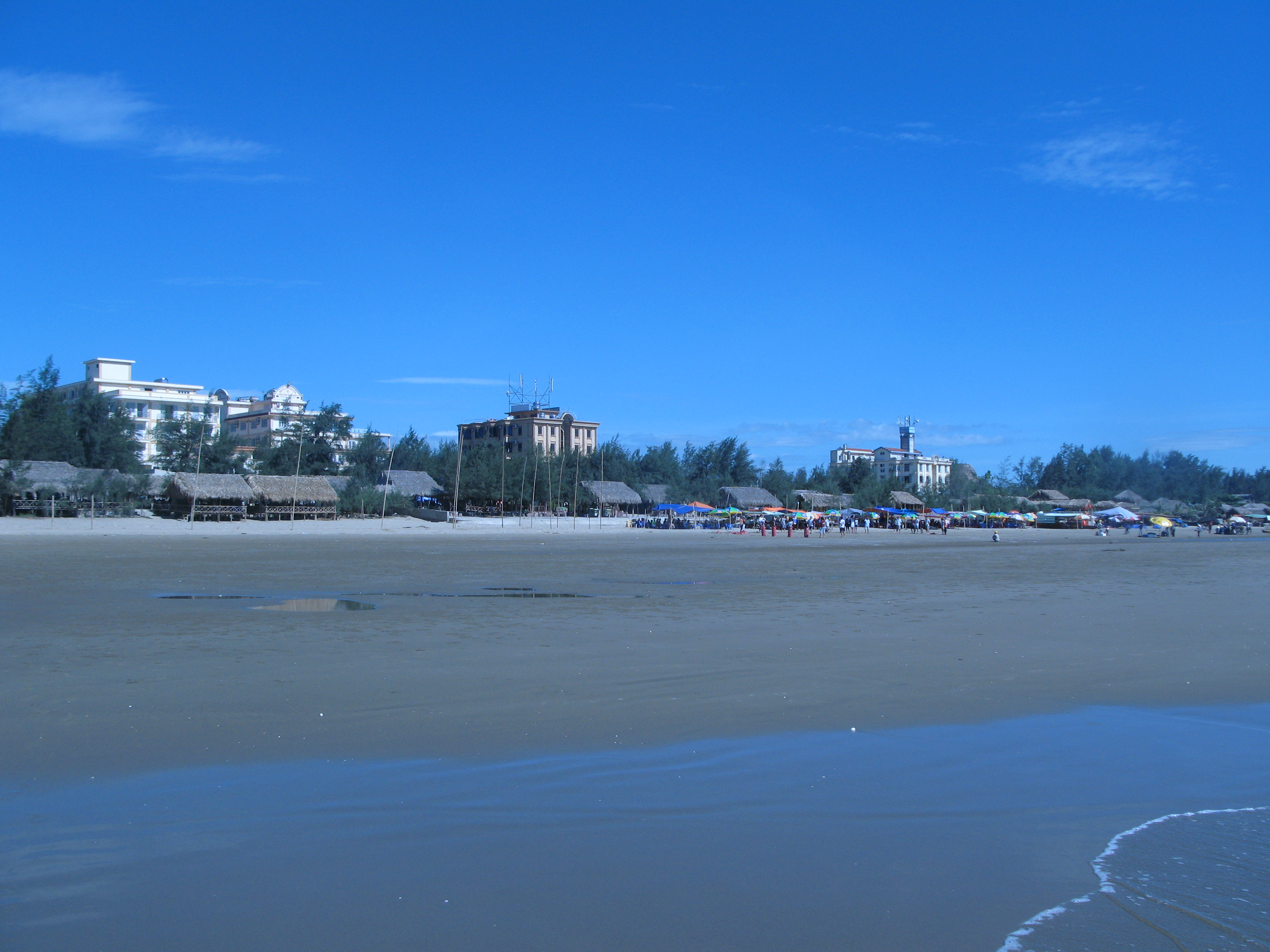 Toàn cảnh bãi biển Hải Hòa, huyện Tĩnh Gia, Thanh Hóa. Từ trái sang phải: Khách sạn Cao Nguyễn, Khách sạn Đại dương, Khách sạn Xanh Hà ACB